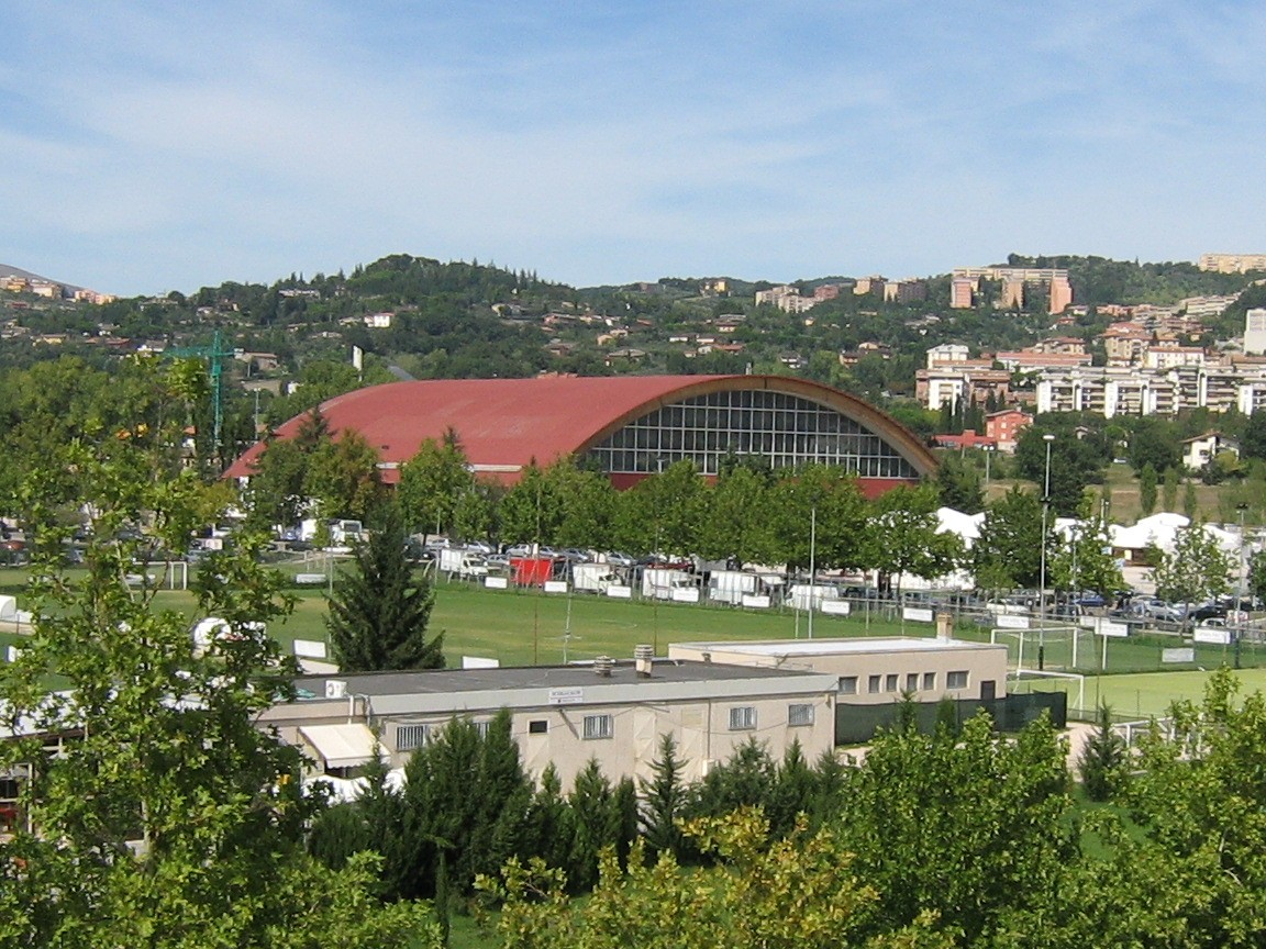 Pala evangelisti, zoom